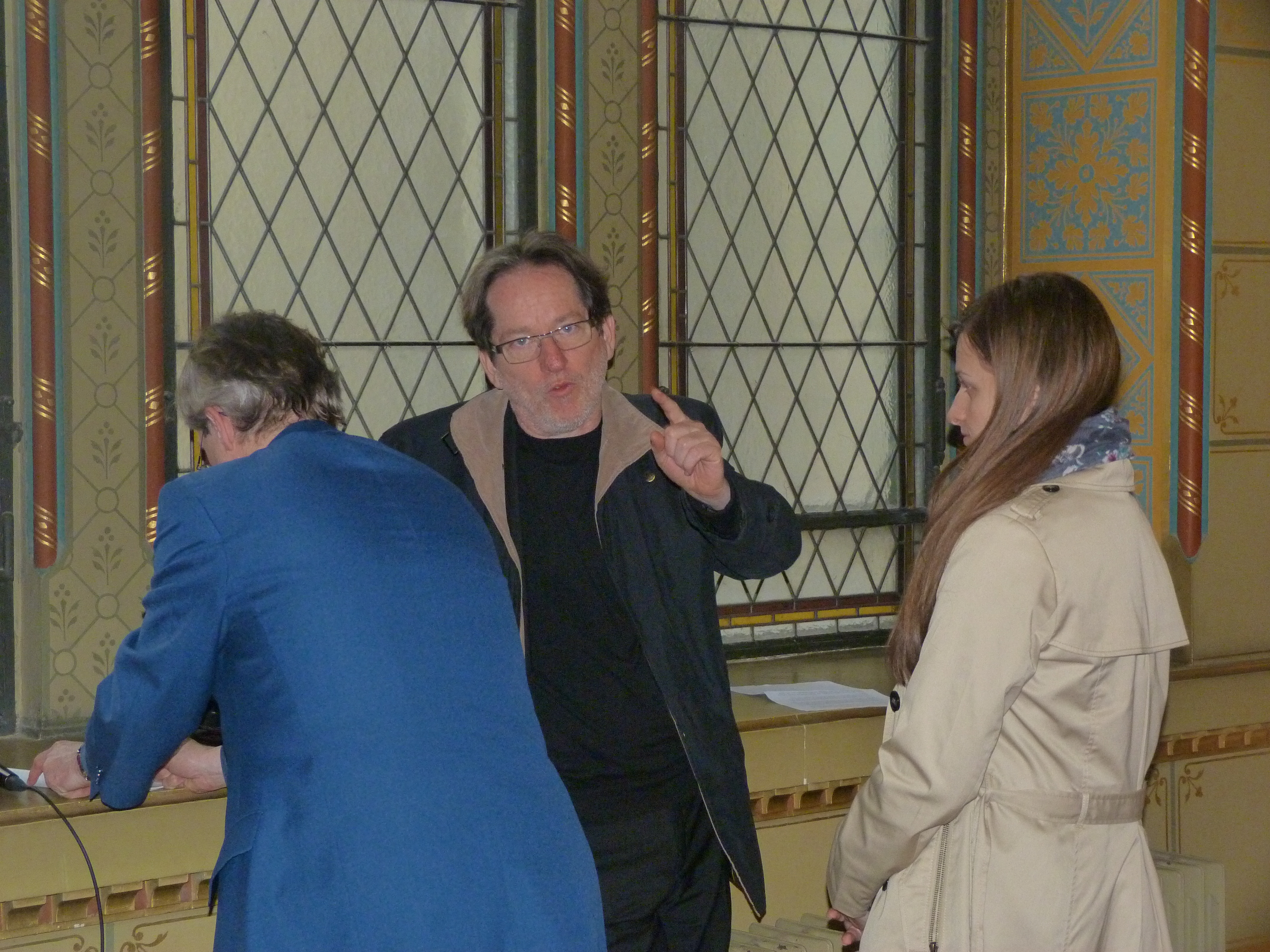 A felvétel 2014. április 2-án készült Budapesten, az Országházban. Március 26–án szerdán, rendkívüli sajtótájékoztatón jelentette be Orbán Viktor miniszterelnök, hogy Magyarország visszaszerezte és hazaszállította a Seuso-kincs hét darabját, mely három hónapon át megtekinthető az Országházban. A Seuso-kincs késő császárkori - helyenként aranyozott - ezüst ünnepi étkészlet. Tulajdonosa, Seuso a 4. század végén, 5. század elején rejthette el a Polgárdi szőlőhegyen. Ez a terület a Balatonnal határos volt abban az időben. A ma ismert és fennmaradt, késő császárkori kincsleletek közül ez a legértékesebb. Jelen tétel tartalma: Seuso-tálak, tisztálkodáshoz használt edények. Baán László. Források: A Seuso-kincs darabjait is rejtheti az otthoni családi ezüst - See more at: ©© Derzsi Elekes Andor, Budapest, 2014, A kép és filmfelvételek egészben, vagy részletekben másolását, bármilyen úton történő sokszorosítását és felhasználását a szerző ellenérték nélkül, jogutódjaira is kihatóan megengedi. Az engedély kiterjed a kereskedelmi célú hasznosításra is. Kéri azonban nevének feltüntetését a felhasználás során. A Metapolisz sorozat valamennyi képe és filmje Creative Commons alatti valamint kereskedelmi - for profit - célra is felhasználható. Ajánlott hivatkozás: Derzsi Elekes Andor: Metapolisz DVD line